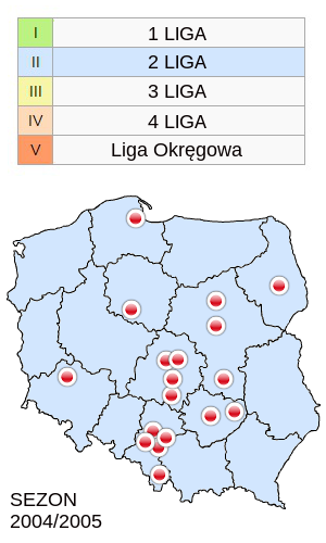 Jagiellonia Białystok w sezonie 2004/2005 -mapka